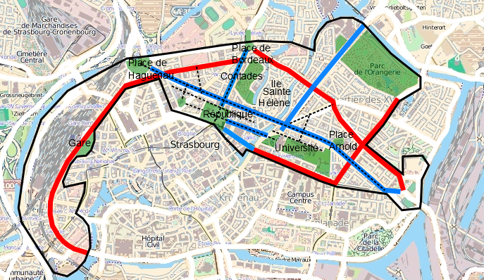 Plan schématique de la Neustadt de Strasbourg. En noir: limites de la Neustadt. En rouge: ceinture de boulevards. En bleu: principales avenues. En pointillés: perspectives. En vert: espaces verts.